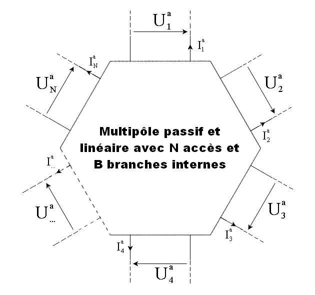 Schéma électrique explicatif.